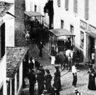 Carros americanos (tracção animal sobre carris) no Funchal (Madeira, Portugal). →This file has been extracted from another file: Americanos Funchal (Rua do pombal).jpg